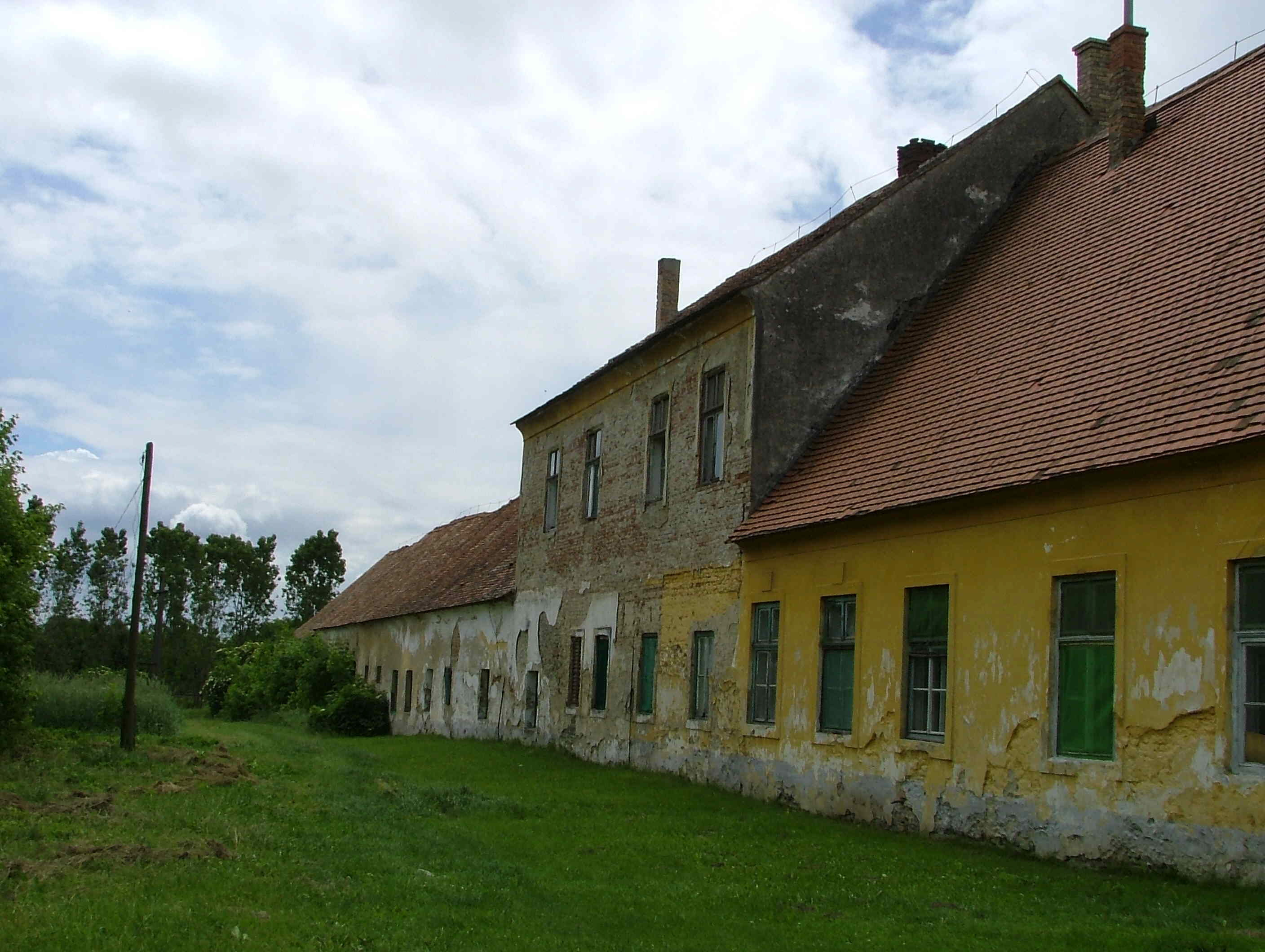 Schloss Revay